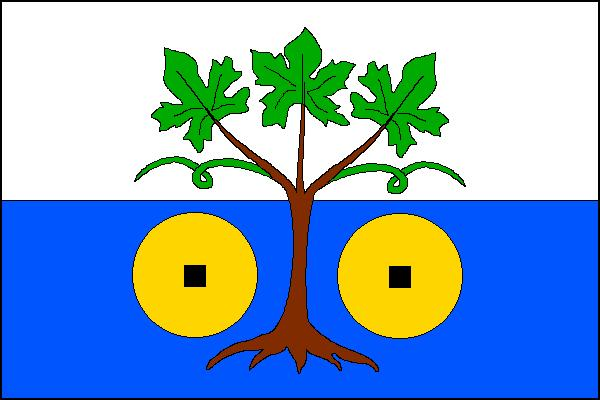 Vlajka obce Malé Žernoseky